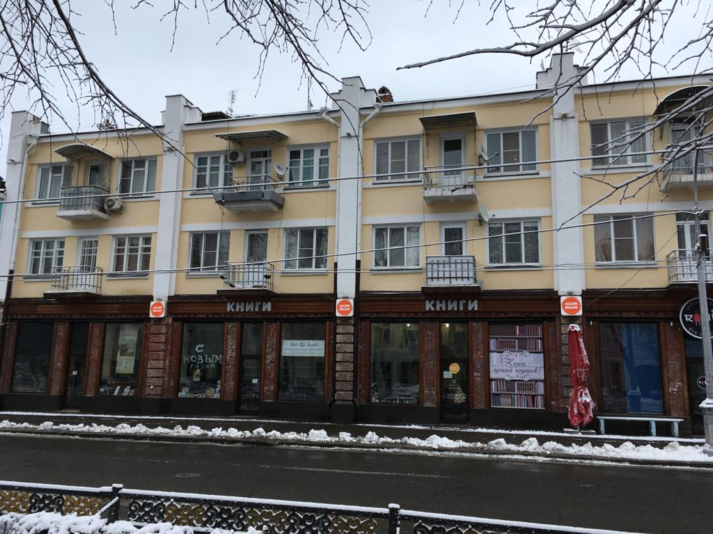 Проспект Мира 12, левая часть дома